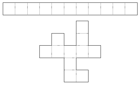 Description: Surfaces équivalentes Auteur: Yann Langlais Source: Création personnelle Site